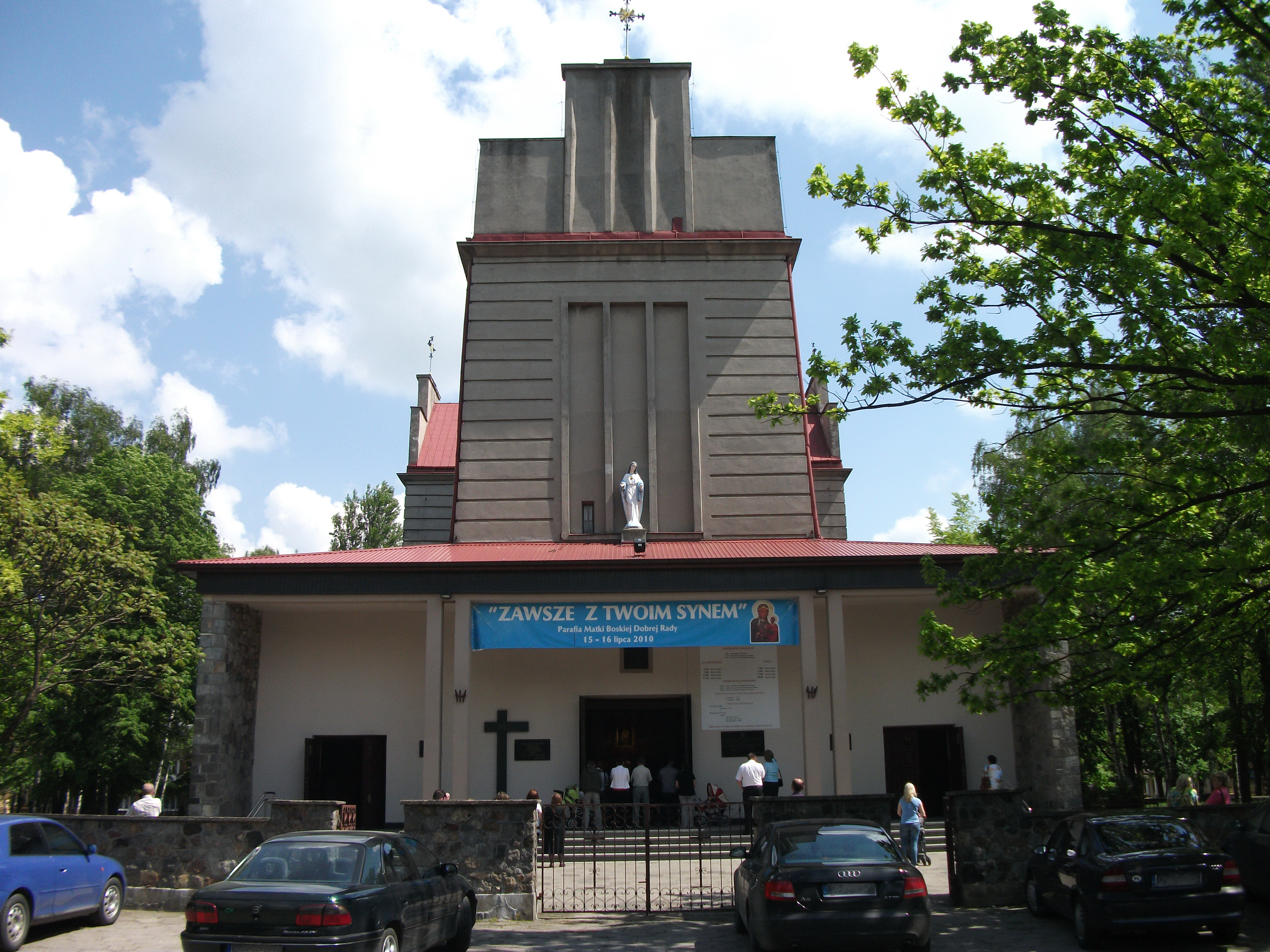 Kościół MBDR w Zgierzu